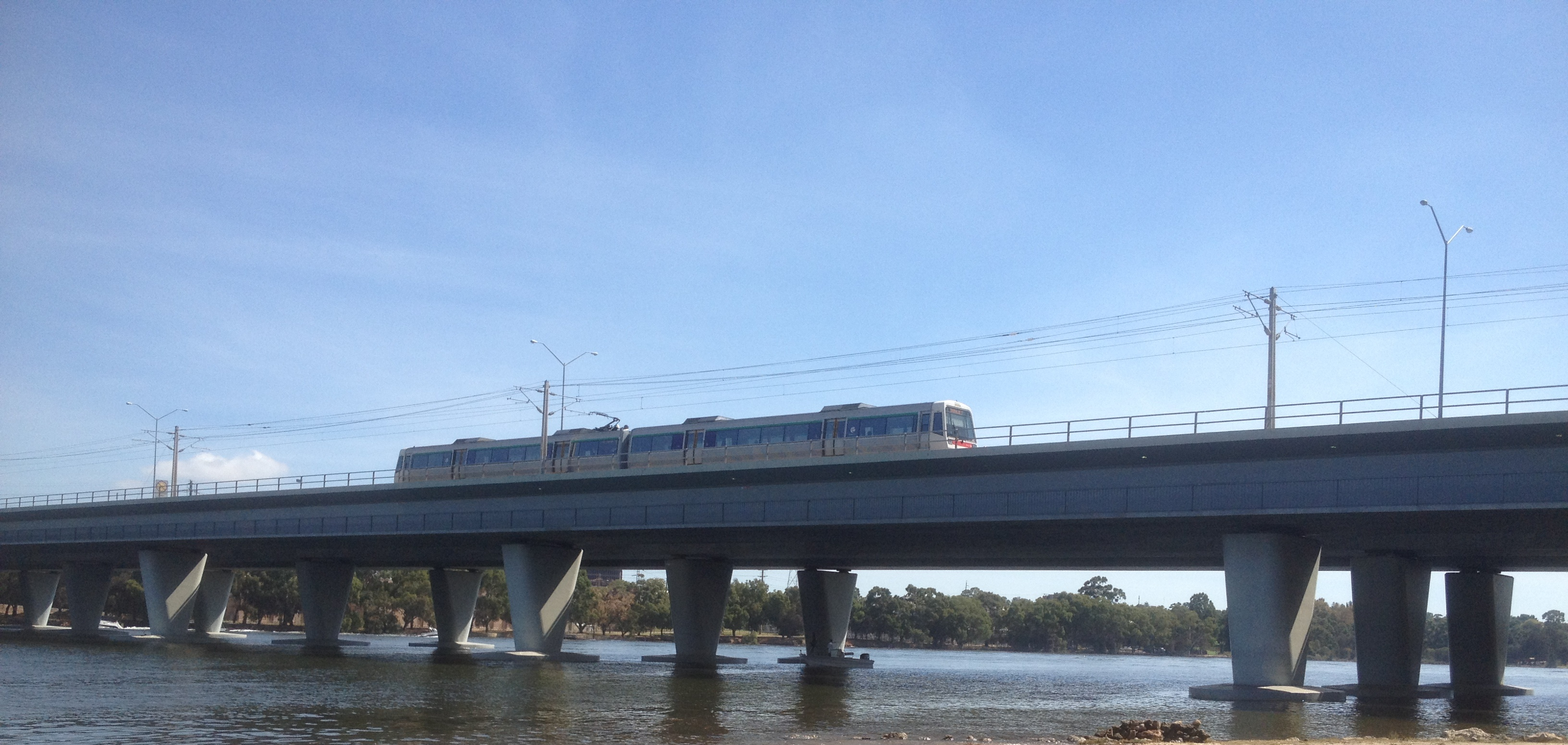 Goongoonup Bridge